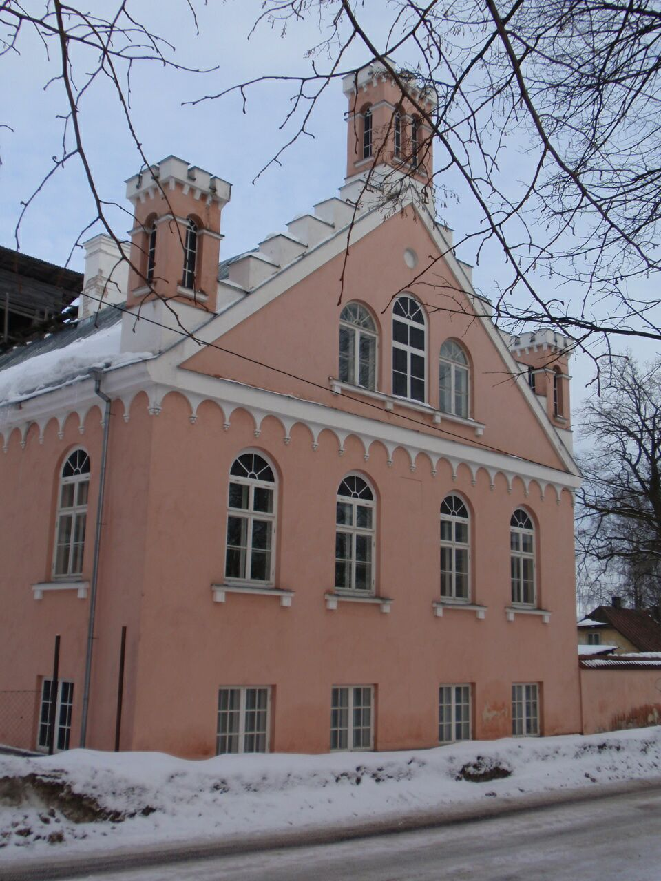 Karlova mõis Tartus.